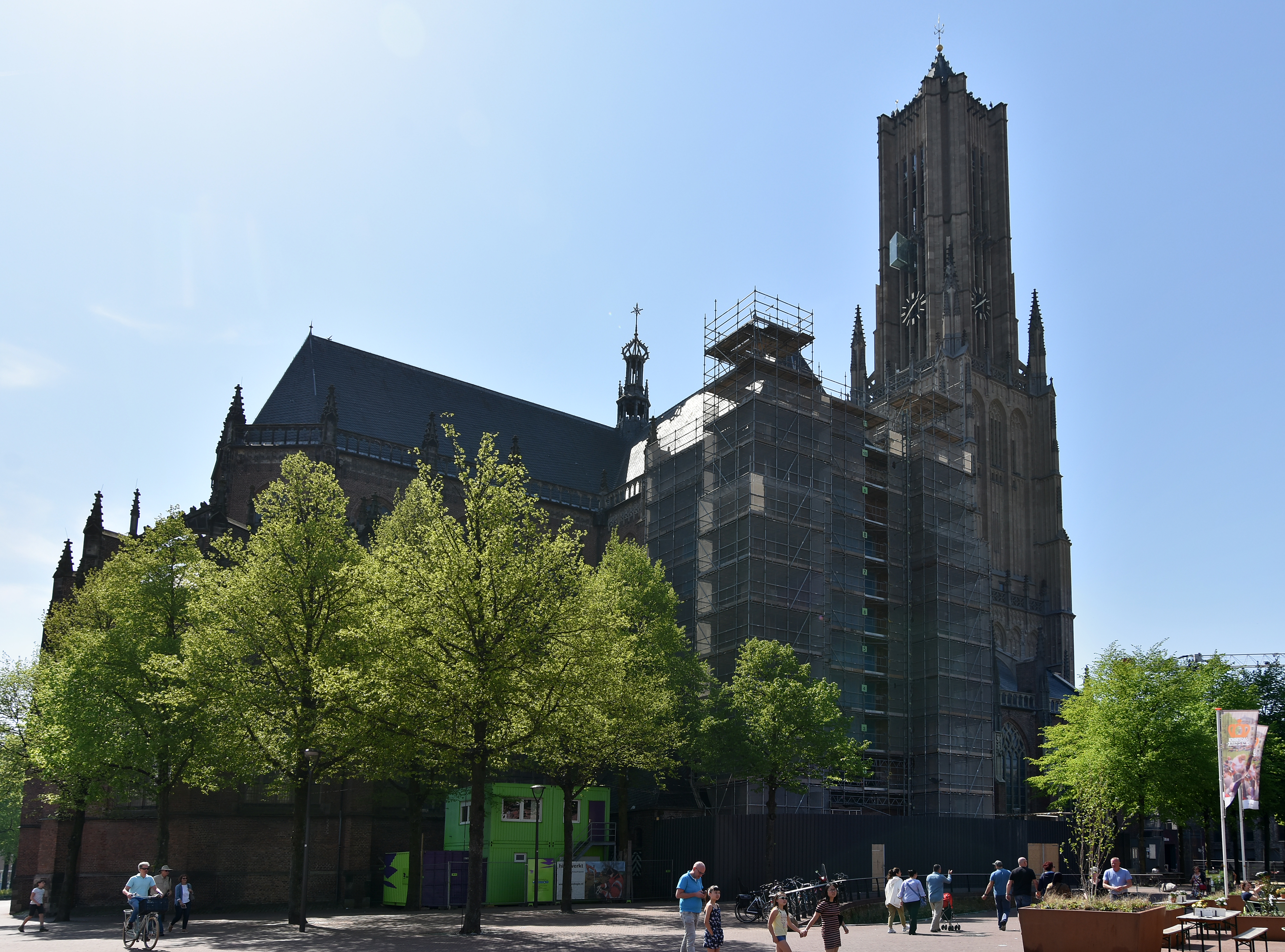 Sint-Eusebiuskerk Arnhem 22-04-2019 12-37-05